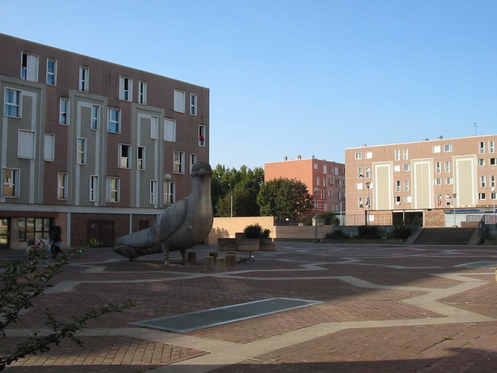 Ile-de-France / Essonne / Grigny / Quartier de la Grande Borne / Place de la Treille